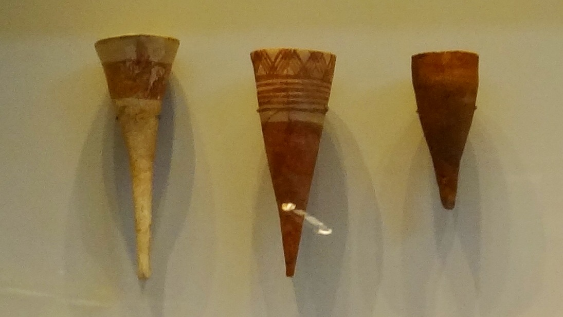 Chalcolithic Cornetl called Bazikh בָּזִיךְ (או בָּזֵךְ; באנגלית:) גביע (נקרא גם "גביע קרן") דמוי משפך, מהתקופה הכלקוליתית, אשר ככל הנראה שימש לפולחן.